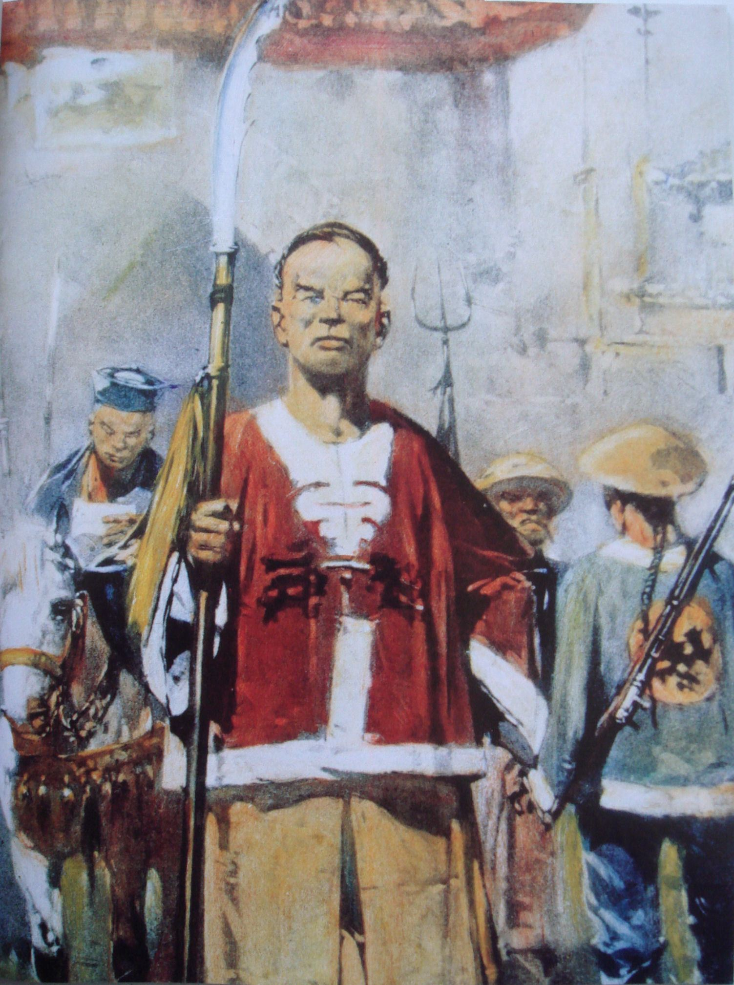 Boxers Drawing By Koekkoek, circa 1900